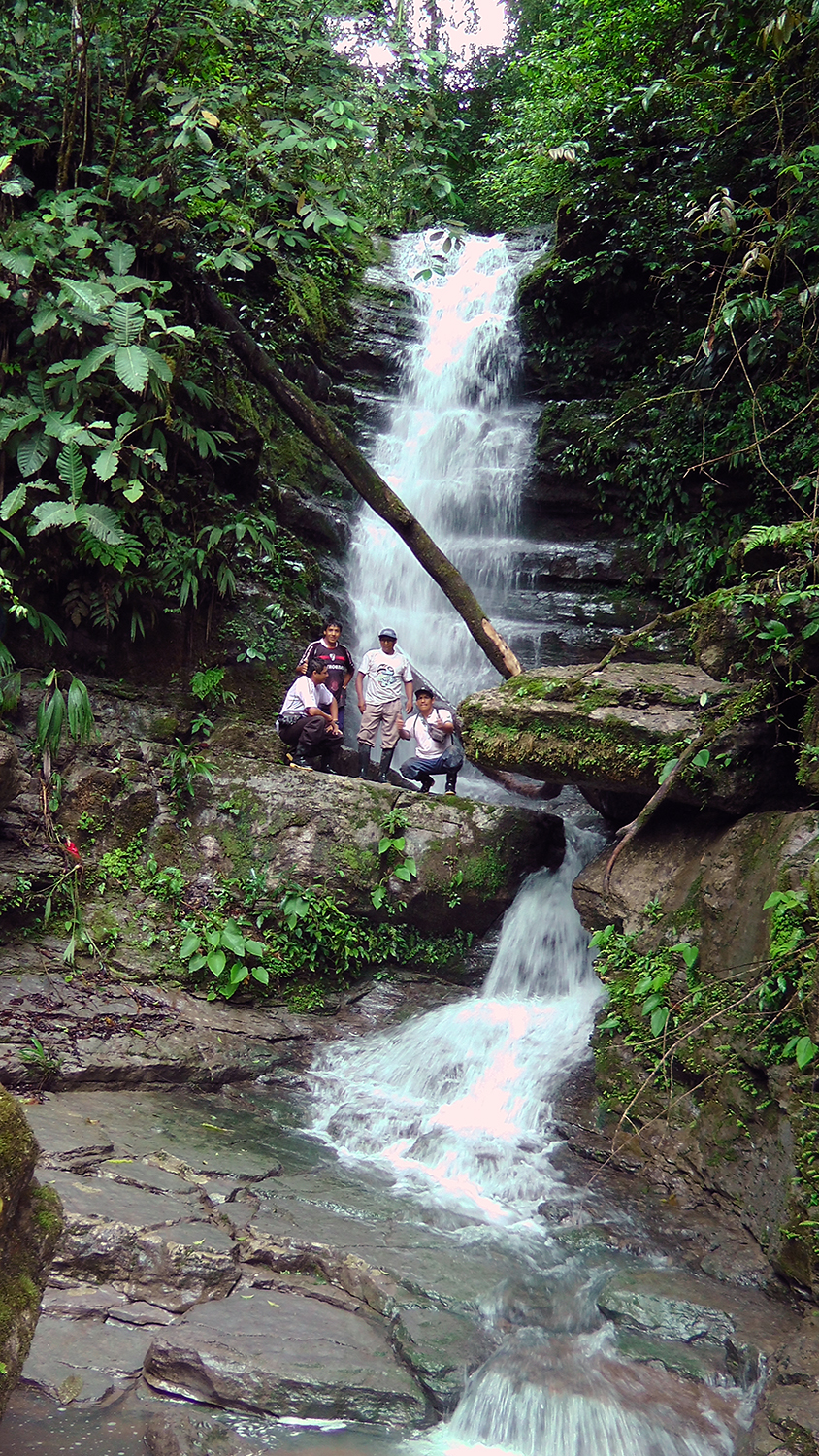 CASCADA